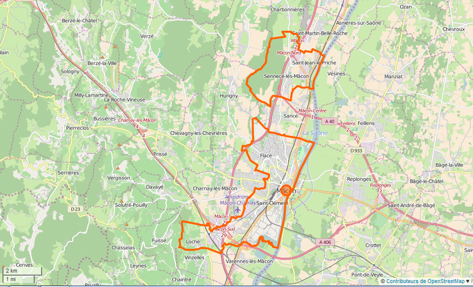 Mâcon Limite communale This map may be incomplete, and may contain errors. Don't rely solely on it for navigation.